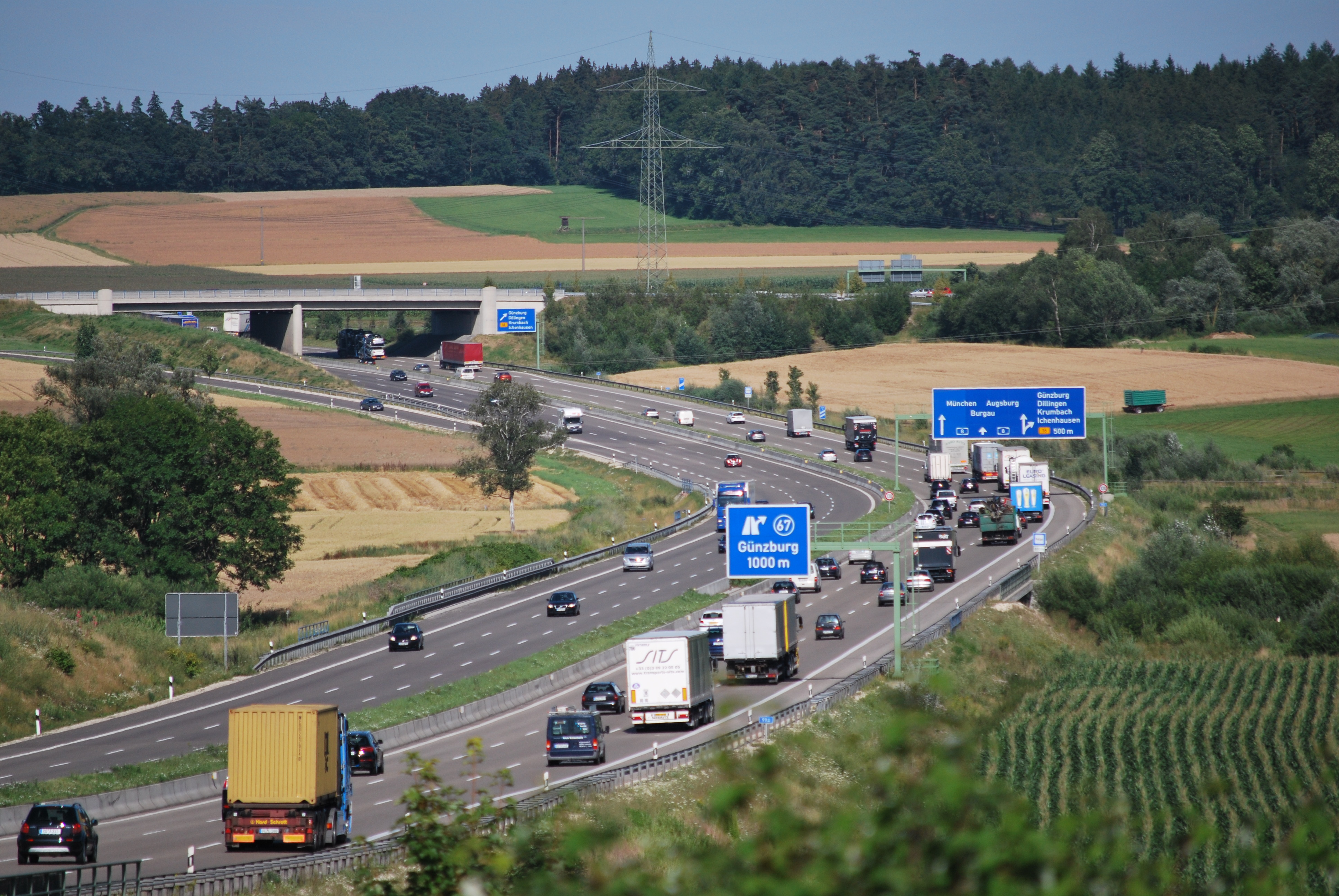 A8 zwischen Bubesheim und AS Günzburg